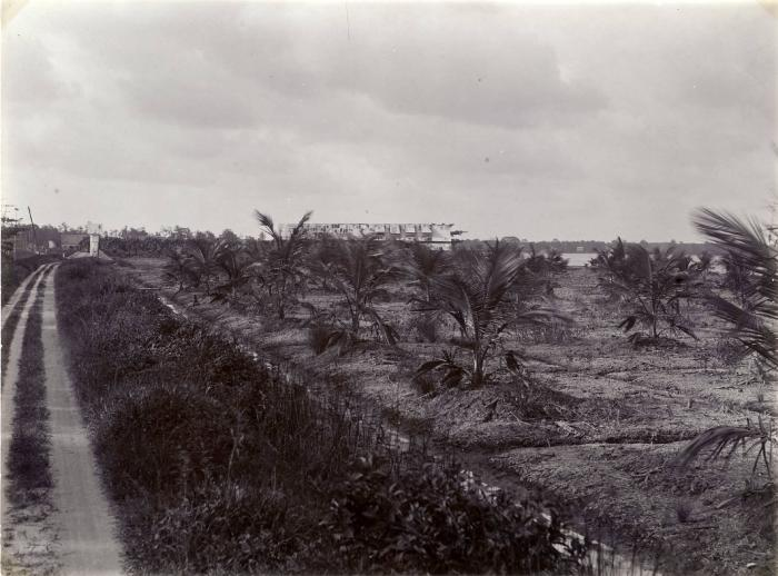 Foto. 3/ Cocos 2½ jaar oud, in veld voorland B. a/de kant van Pl. de Morgenstond Men ziet een gedeelte van den rij-weg- (voorpolder door [?]) naar Paramaribo, en de sluis van Pl: Clevia, en het gebouw van de voormalige steenfabriek van Gebr. Gonggrijp In dat gebouw zijn 5 miljoen steenen gemaakt, en met moeite verkocht à 22½ - /25 per mille de kostprijs van die steenen was ± /12 per mille aan werkloon en brandstof. Van de gebroken steen kwamen wij niet af, en de afzet was nooit meer dan 500.000 steenen per jaar. De fout was voornamelijk het galv. ijzeren dak, - elk jaar moesten wij dit dak vernieuwen, wijl de dampen uit de te kleine steenoven (40.000 st) dit dak verteerde. Het had een pannendak moeten zijn; maar wij hadden daarvoor geen geld. Het slot was ontmoediging en verlies. De vracht van steen is thans F20. pro mille, en de prijs 42-45. pro mille. F m 27 J.W Gonggrijp (vermoedelijk). Een veld met jonge kokosbomen op de plantage Clevia en de voormalige steenfabriek van Gebroeders Gonggrijp aan de Surinamerivier